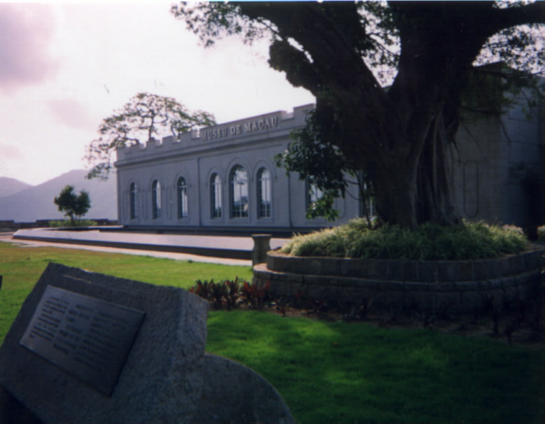 Museu de Macau, em Macau, em junho de 1999.